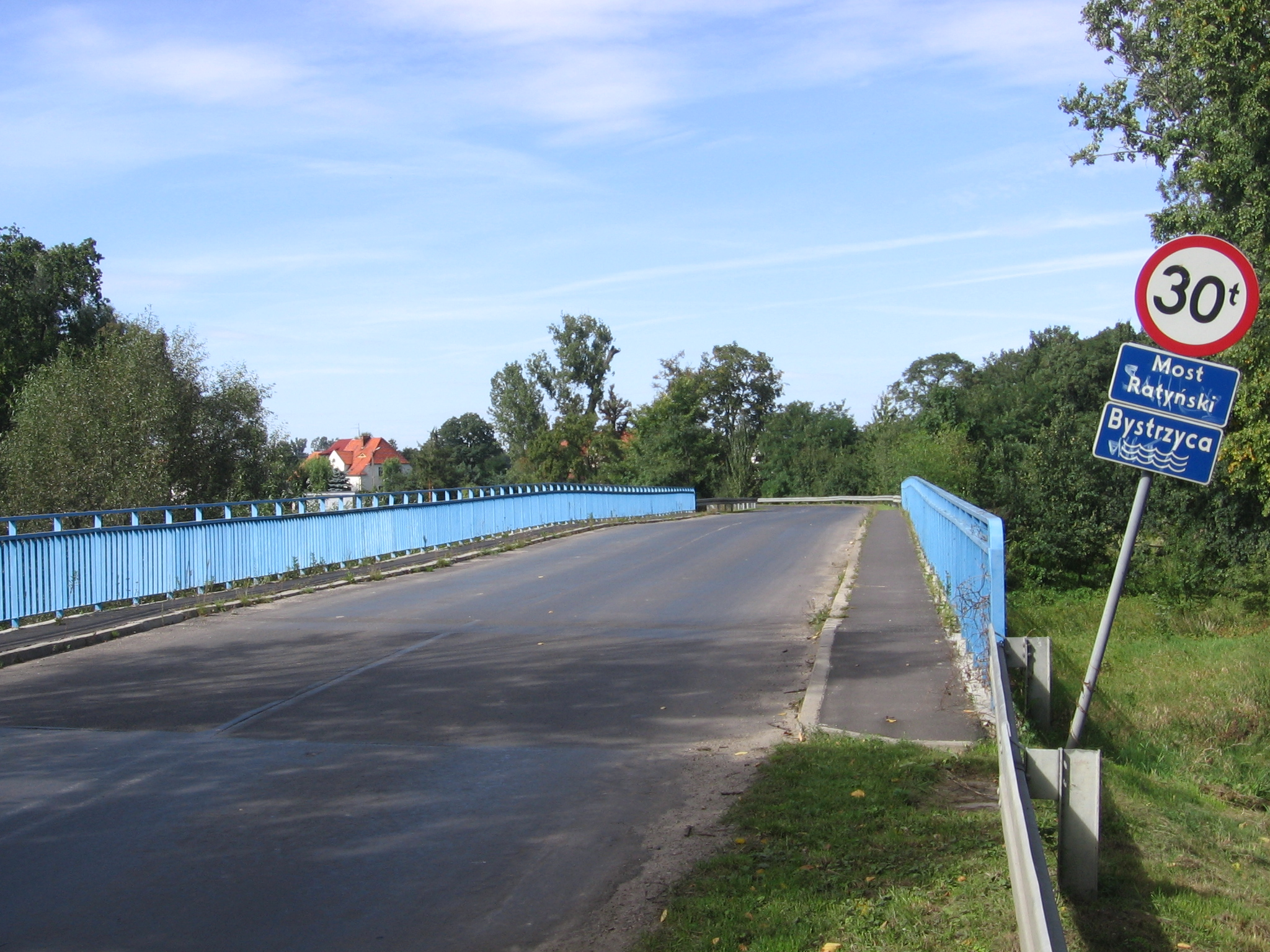 most Ratyński nad Bystrzycą we Wrocławiu